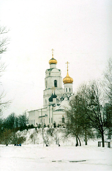 Троицкий собор в Вязьме